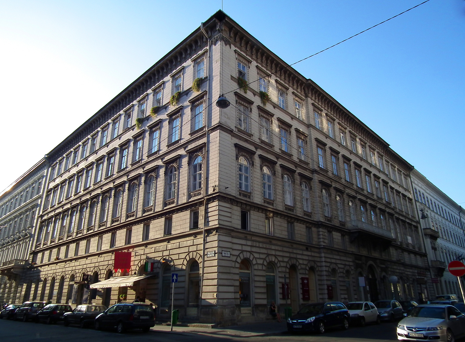 Sarokház (Budapest 5, Nádor utca 20., Arany János utca 12. Máltás Hugó (1829–1922)) This is a photo of a monument in Hungary. Identifier: 565